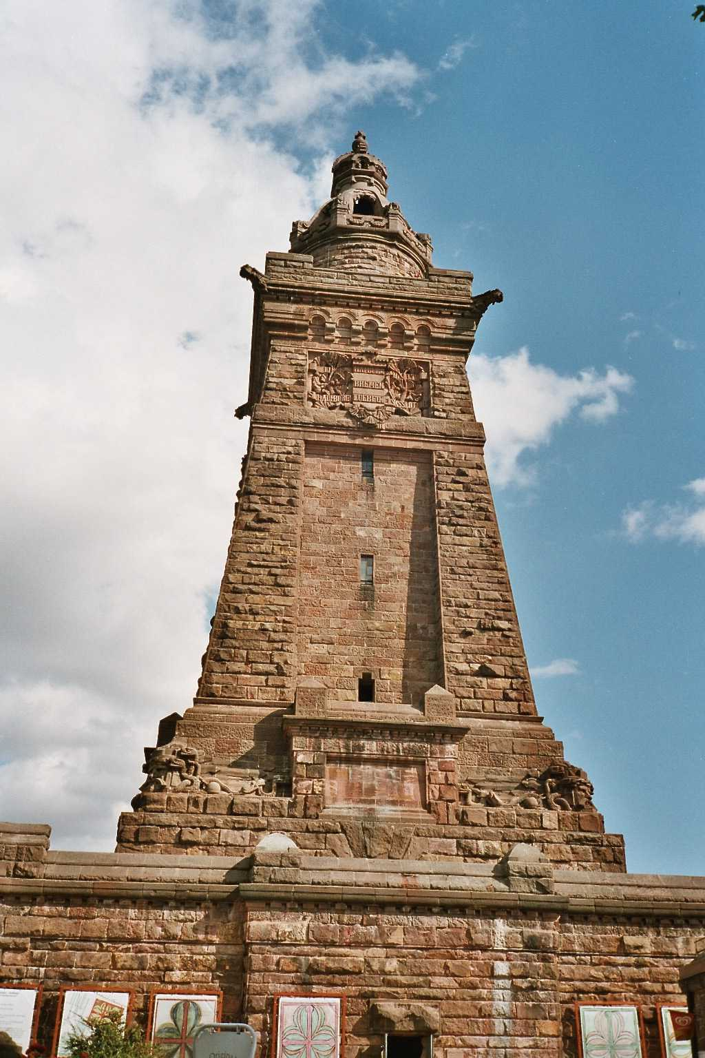 Das Kyffhäuserdenkmal